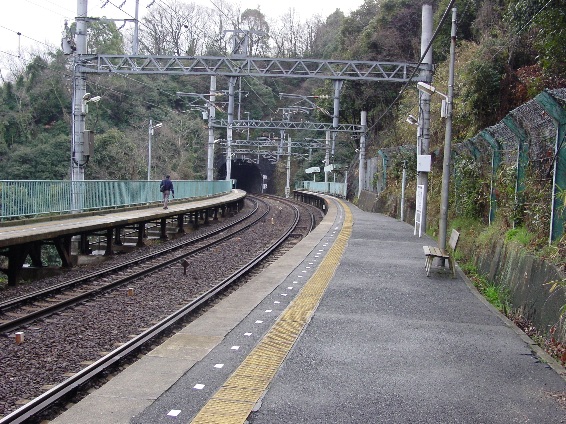 菊水山駅ホーム